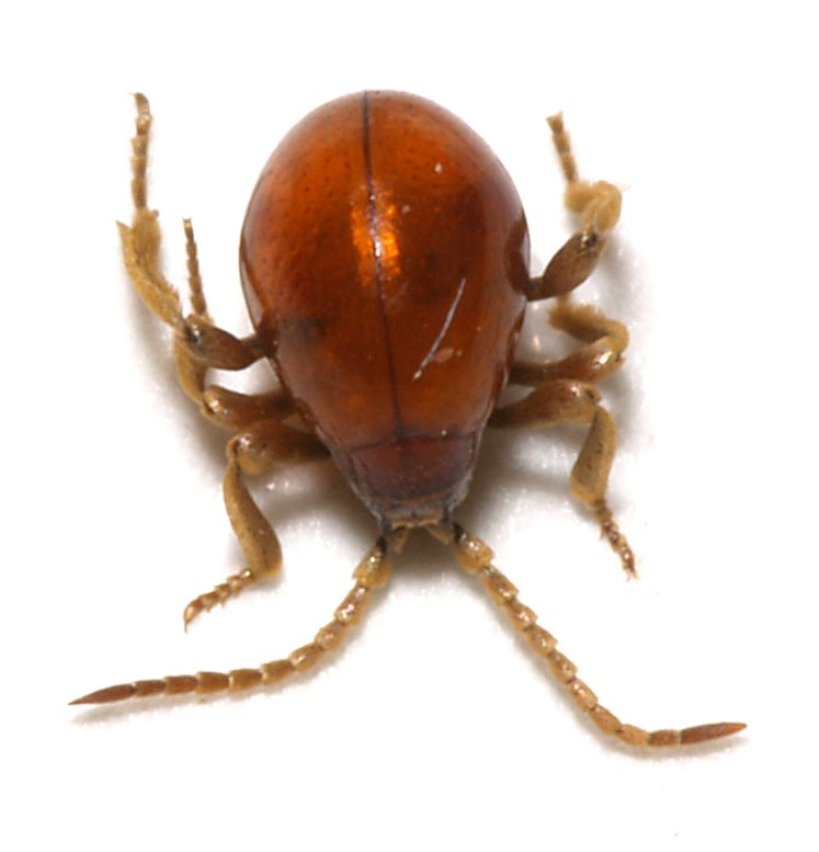 Gibbium psylloides